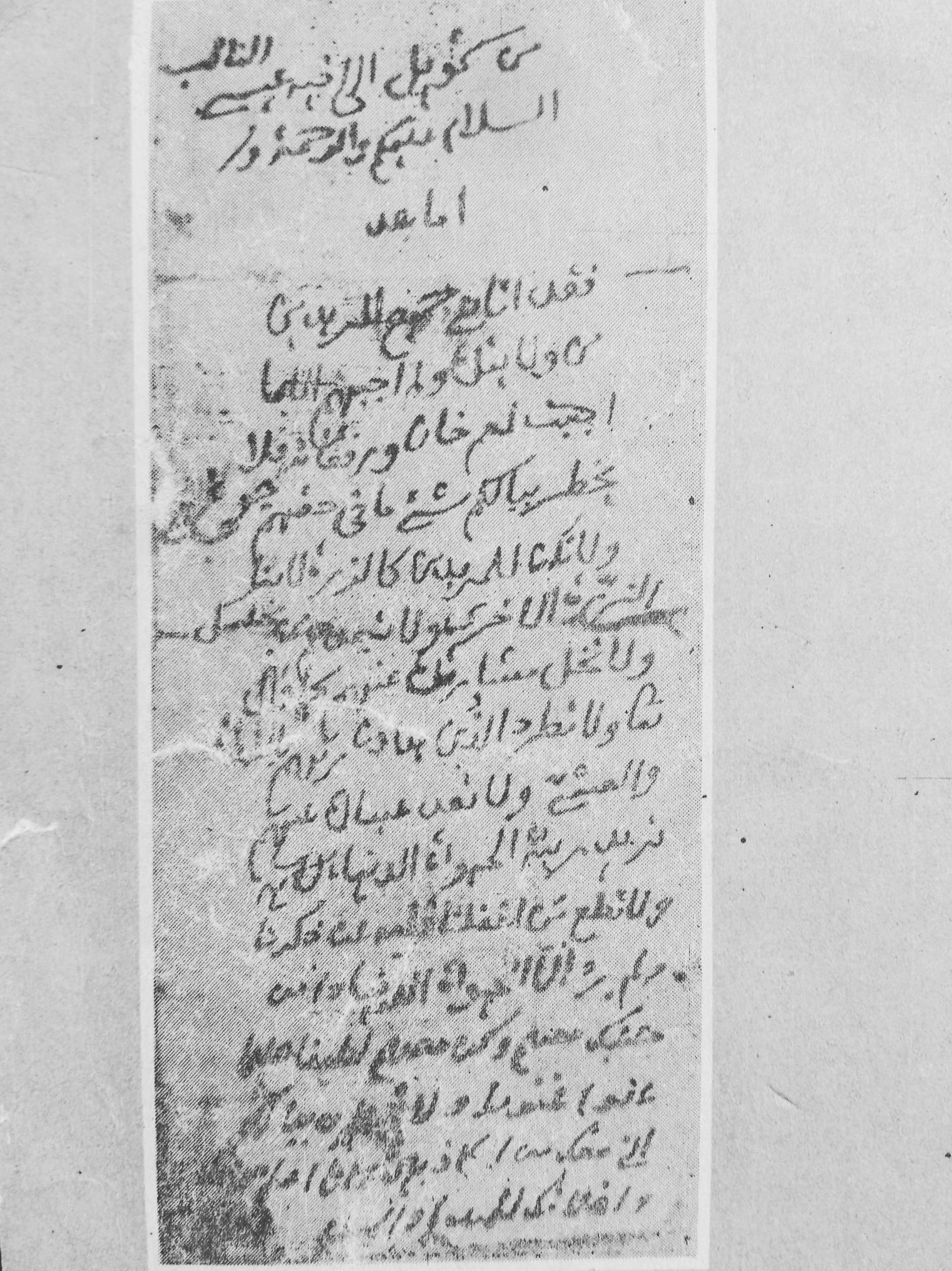 Письмо имама Шамиля (наибу) Исе Гендергеноевскому из Урус-Мартана. Известно, что Иса Гендергеноевский в это время находился в оживленной переписке с имамом Шамилем. «Приветствую тебя, - писал имам своему наибу в одном из писем. - Благослови тебя бог. Ко мне приезжали выборные от твоих людей. Я рассказал им о тех задачах, которые стоят сейчас перед нами. Они известят вас и расскажут вам. Слушайте их. Помни и держи в секрете то, что я предлагал. Подтверждено подписью и печатью». В другом письме, обнаруженном в Урус-Мартане, сказано следующее: «От Шамиля своему брату Исе, наибу. Ассаламу 1алайкум варахьматтуллах1и вабаракатух1у. После этого извещаем тебя, что к нам прибыли мюриды из ваших мест. Я не дал им ответа, кроме ответа, данного Умахану. Не подумай что-нибудь по этому поводу. Действуй в согласии с мюридами. Не отдаляй их от себя и сове-туйся с ними. Пренебрегая собой, всегда будь привержен справедливости, как этом сказано в коране. Не ищи глазами богатств бренного мира. Если даже тебе предложат все земные богатства, не вступай в союз с теми, кто от нас отделился. Во всех своих добрых начинаниях всегда будь с нами . Пусть любовь к земной жизни не отдалит тебя от нас. Защищай доверенные тебе места и будь с людьми. Аминь»